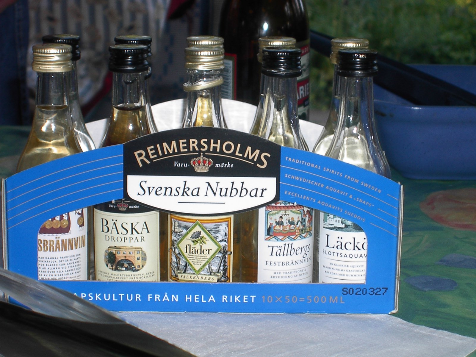 snaps, av diverse olika sorter